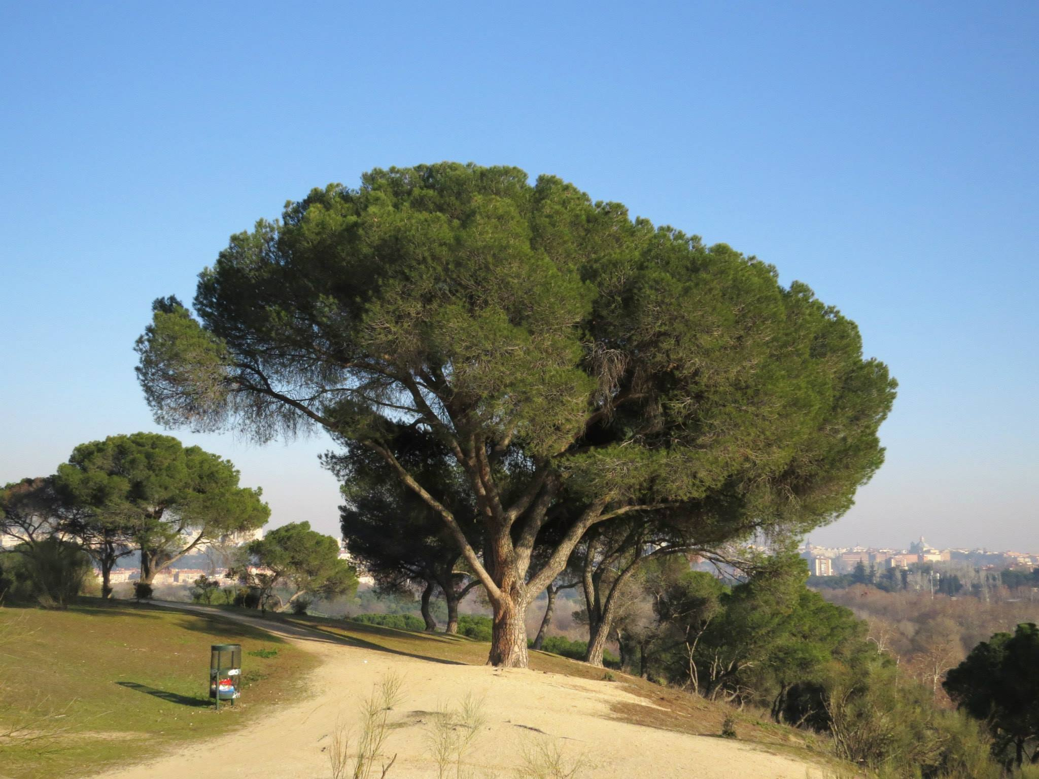 Pino piñonero (Pinus pinea) en la Casa de Campo de Madrid.